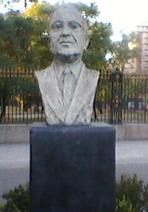 Busto del Dr. Raúl Bercovich Rodríguez en la ciudad de Córdoba (Argentina).